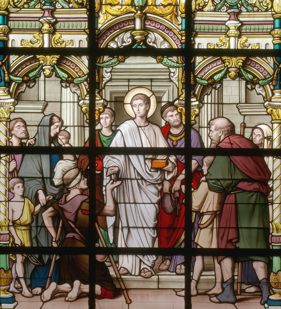 Sint-Laurentiuskerk (Lokeren) - Glasraam - De H. Laurentius helpt de armen (detail)